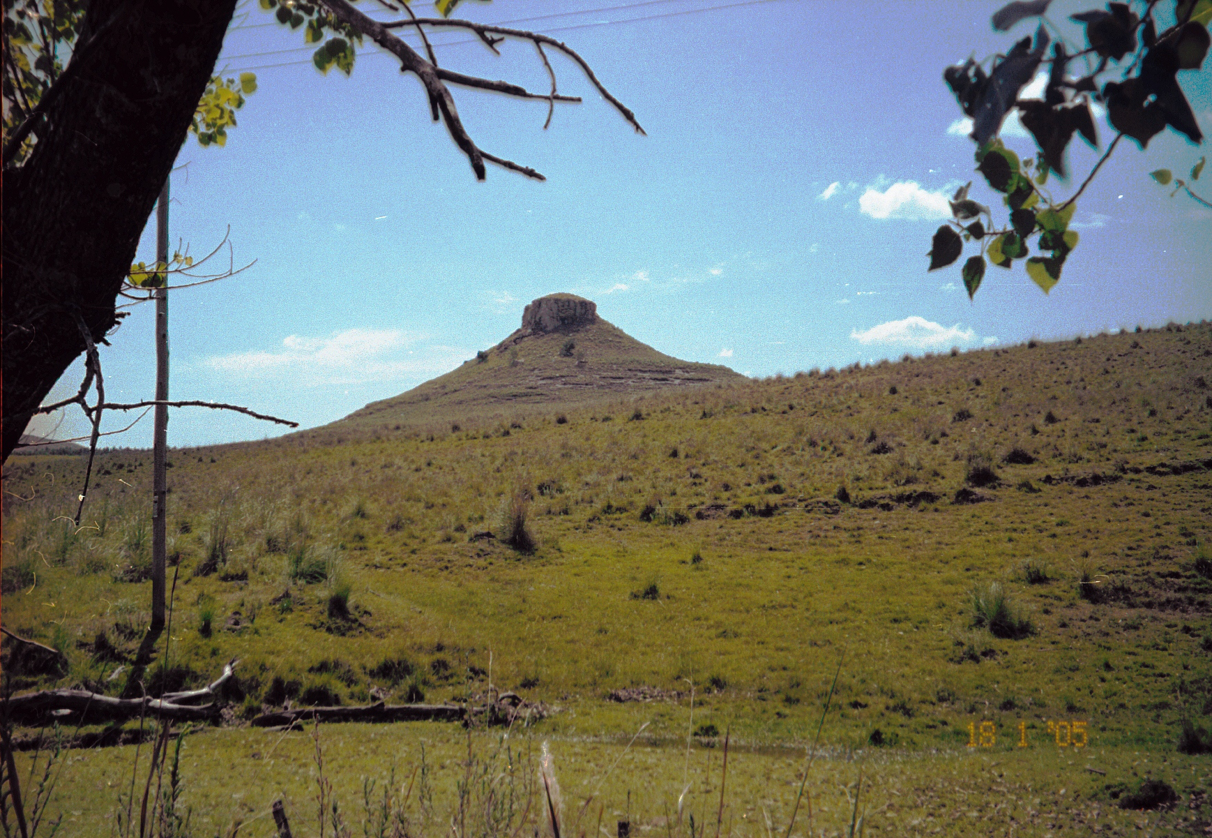 Cerro Batoví, ubicado en el departamento de Tacuarembó, Uruguay.